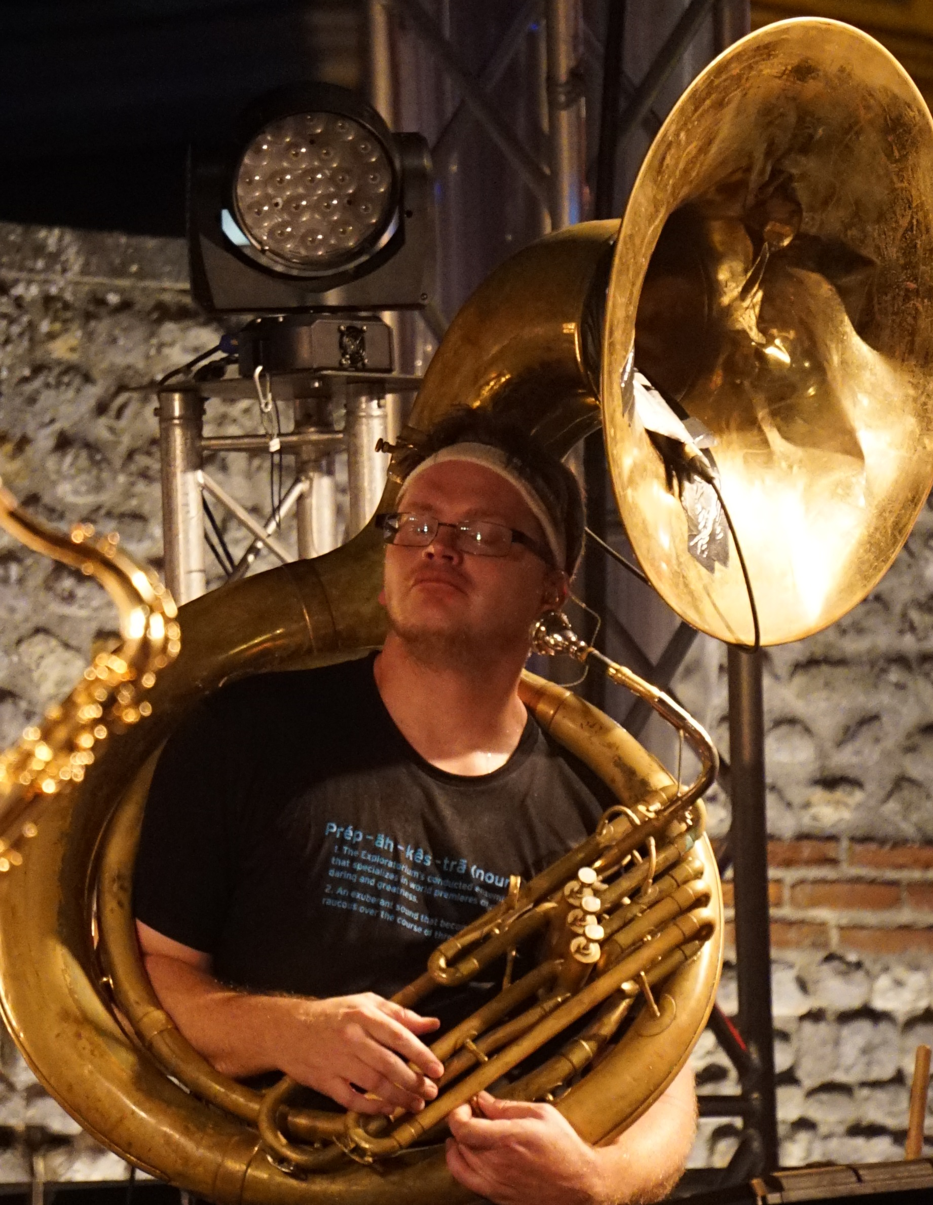 les Youngblood Brass Band à Reims.